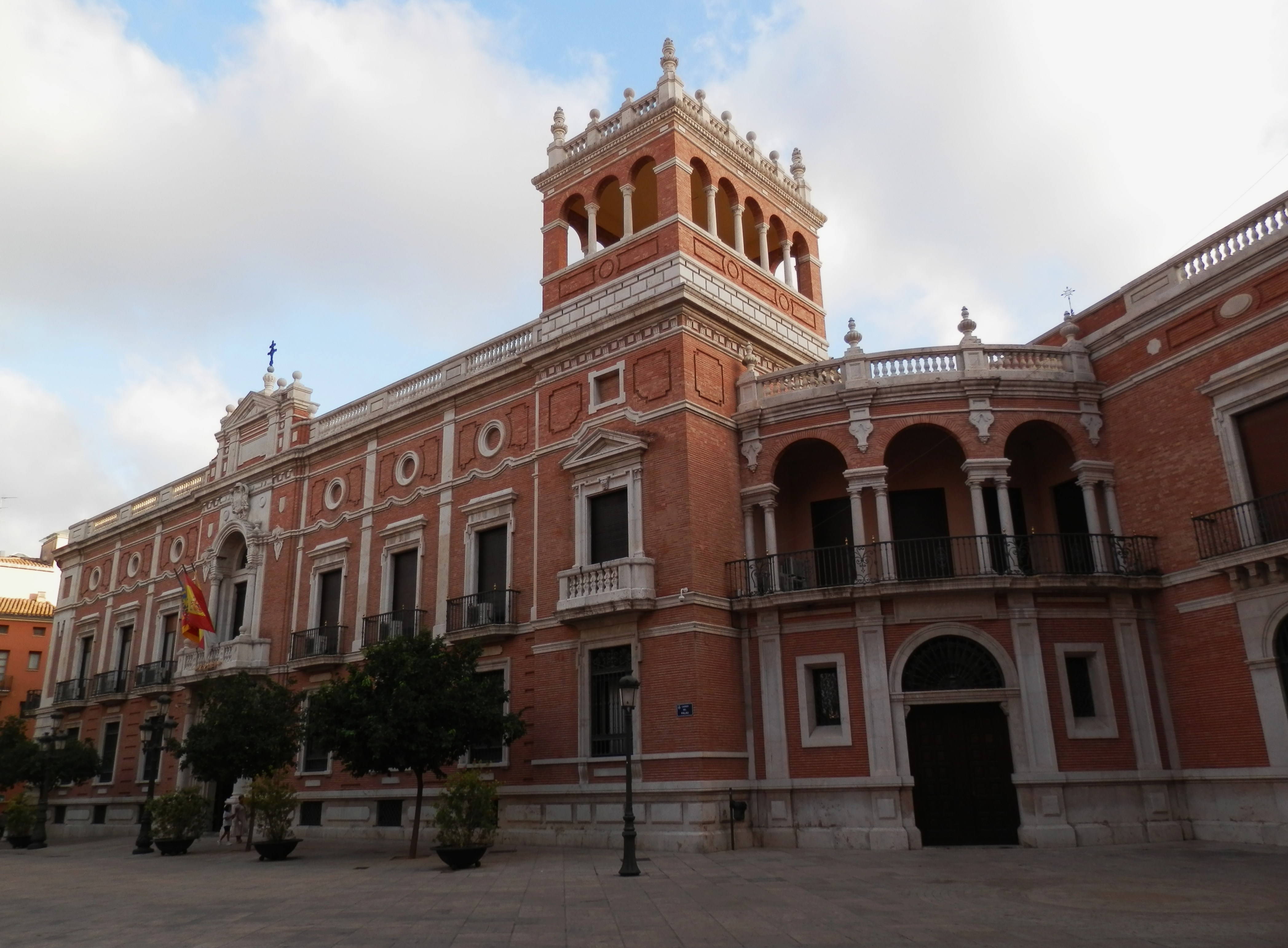 Palau arquebisbal (València).